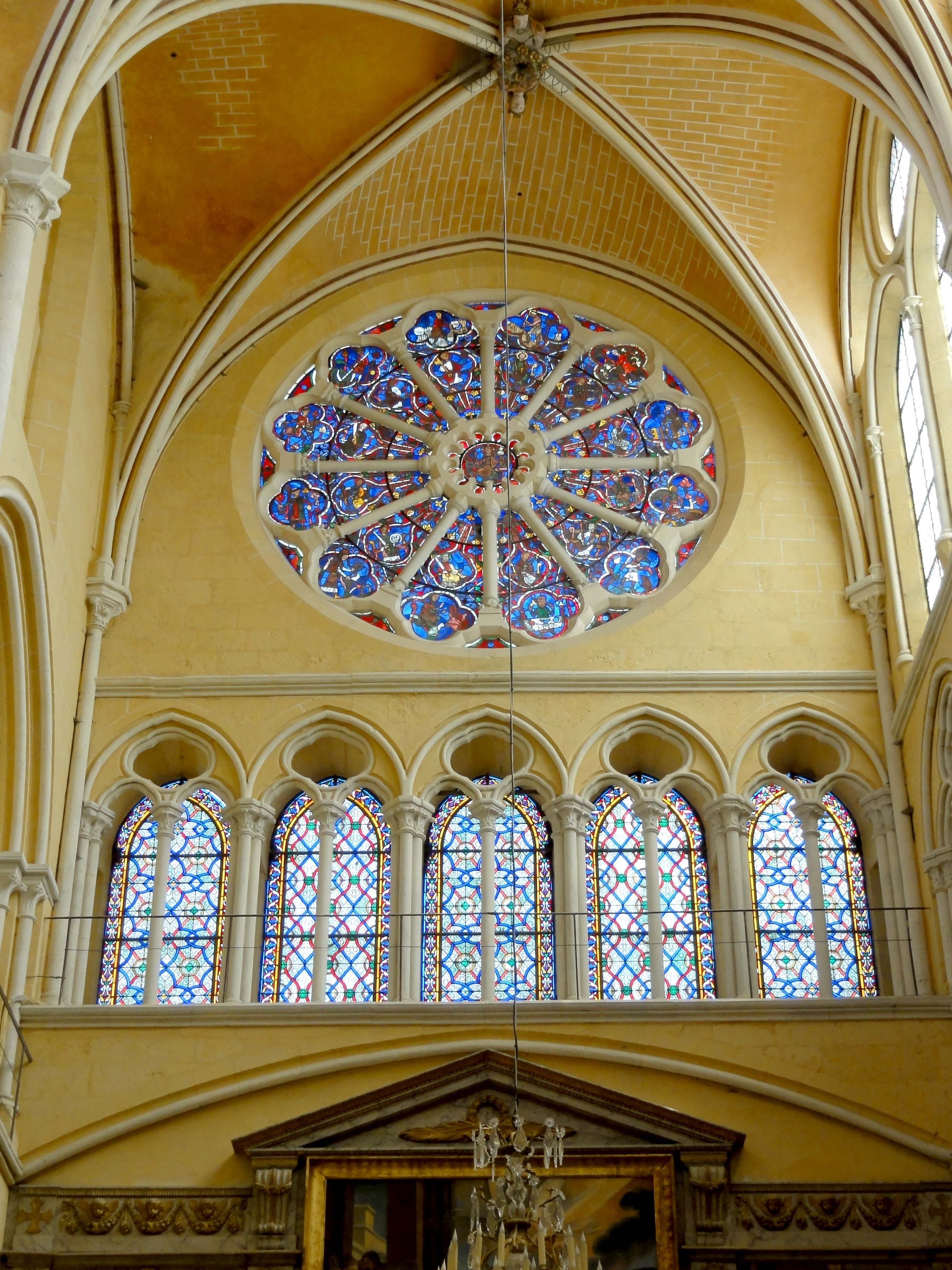 Voir titre.